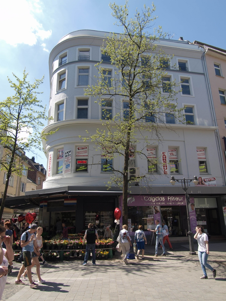 Alte Freiheit Nr. 16 u. 18, Ecke Calvinstraße in Wuppertal-Elberfeld (ehm. Galerie Parnass). Als Denkmal klassifiziert, noch keine Denkmalnr.This is a photograph of an architectural monument. 0